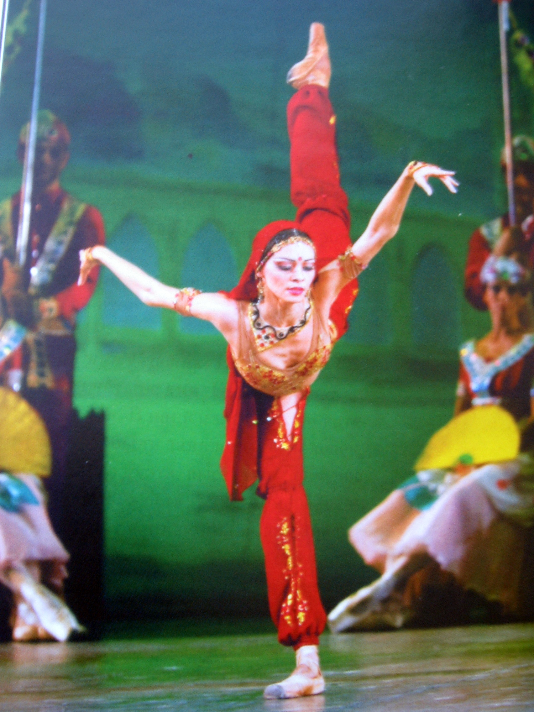 Балет Шехерезада. Марина Вежновец.